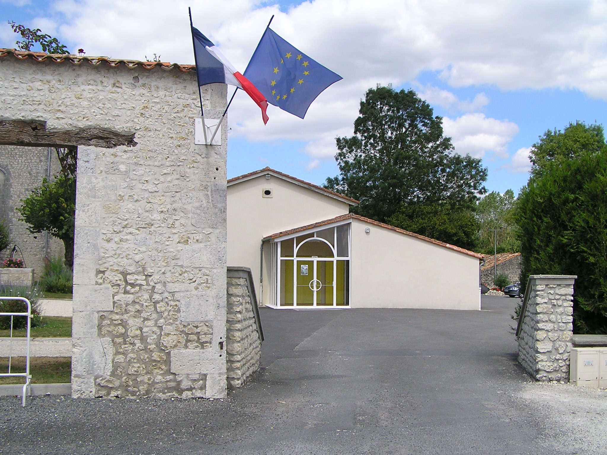 mairie de Lachaise